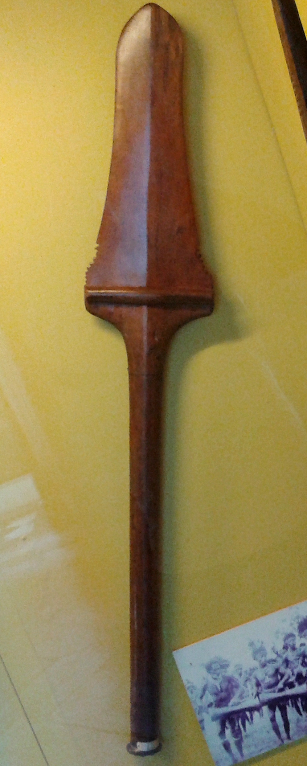 Português do Brasil: Lança - Ilha de Java. Coleção de etnologia do Museu Nacional/UFRJ - Rio de Janeiro, Brasil.